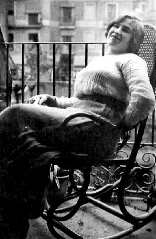 Llibertat Ródenas Rodriguez (1892 - 1970) est une anarcho-syndicaliste catalane espagnole membre de la Confédération nationale du travail et militante libertaire.